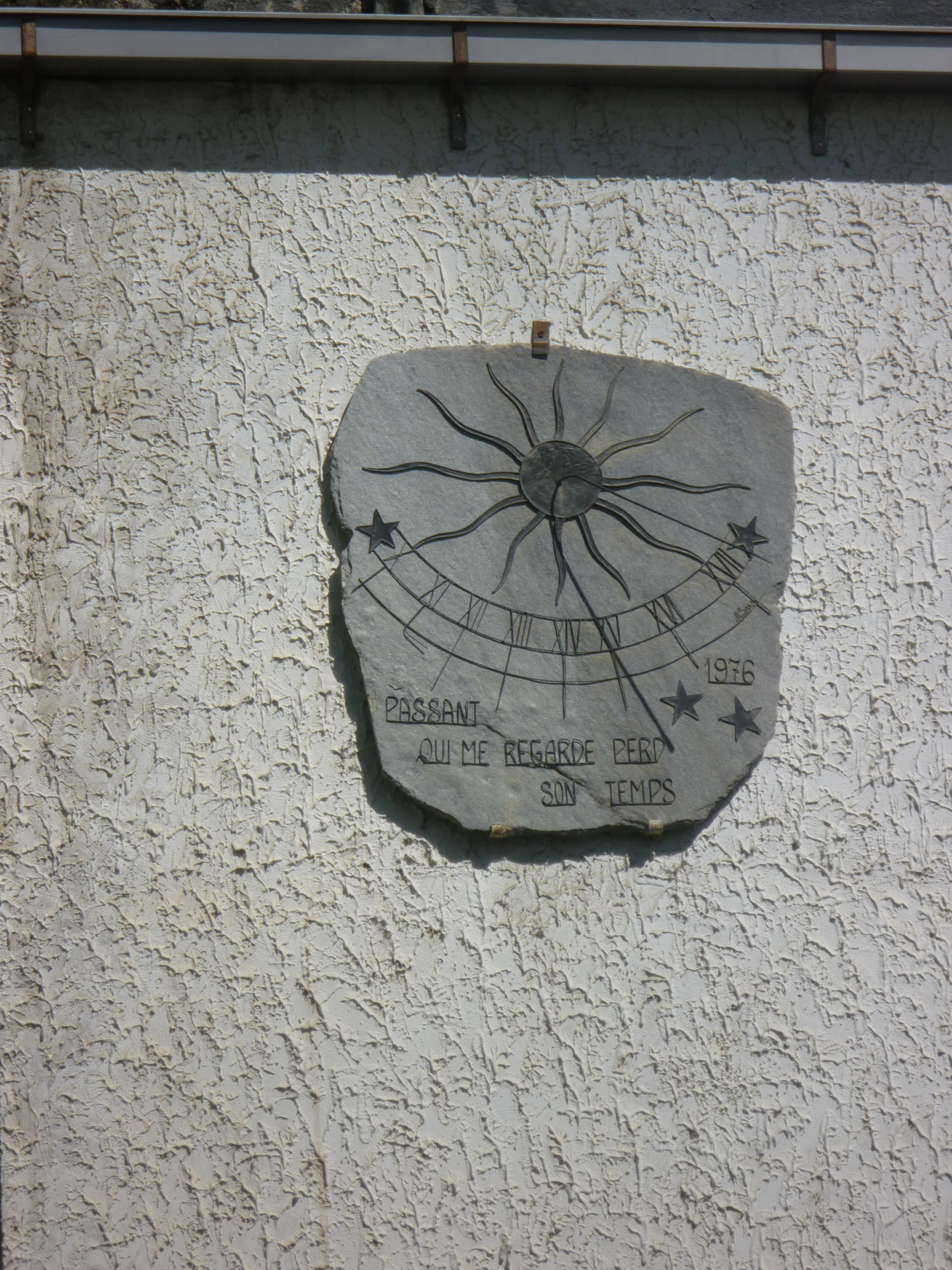 Cadran solaire à (Châtillon, Vallée d'Aoste)